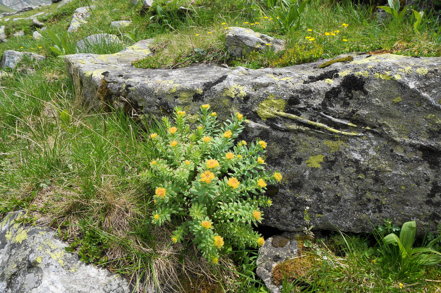 Inneres Pöllatal This media shows the nature reserve in Carinthia with the ID NSG.019.